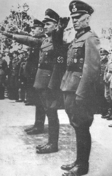 Nemška uprava Operacijske cone Jadransko primorje. Od leve: general SS Odilo Globočnik, gauleiter Friedrich Rainer, general Ludwig Kübler.